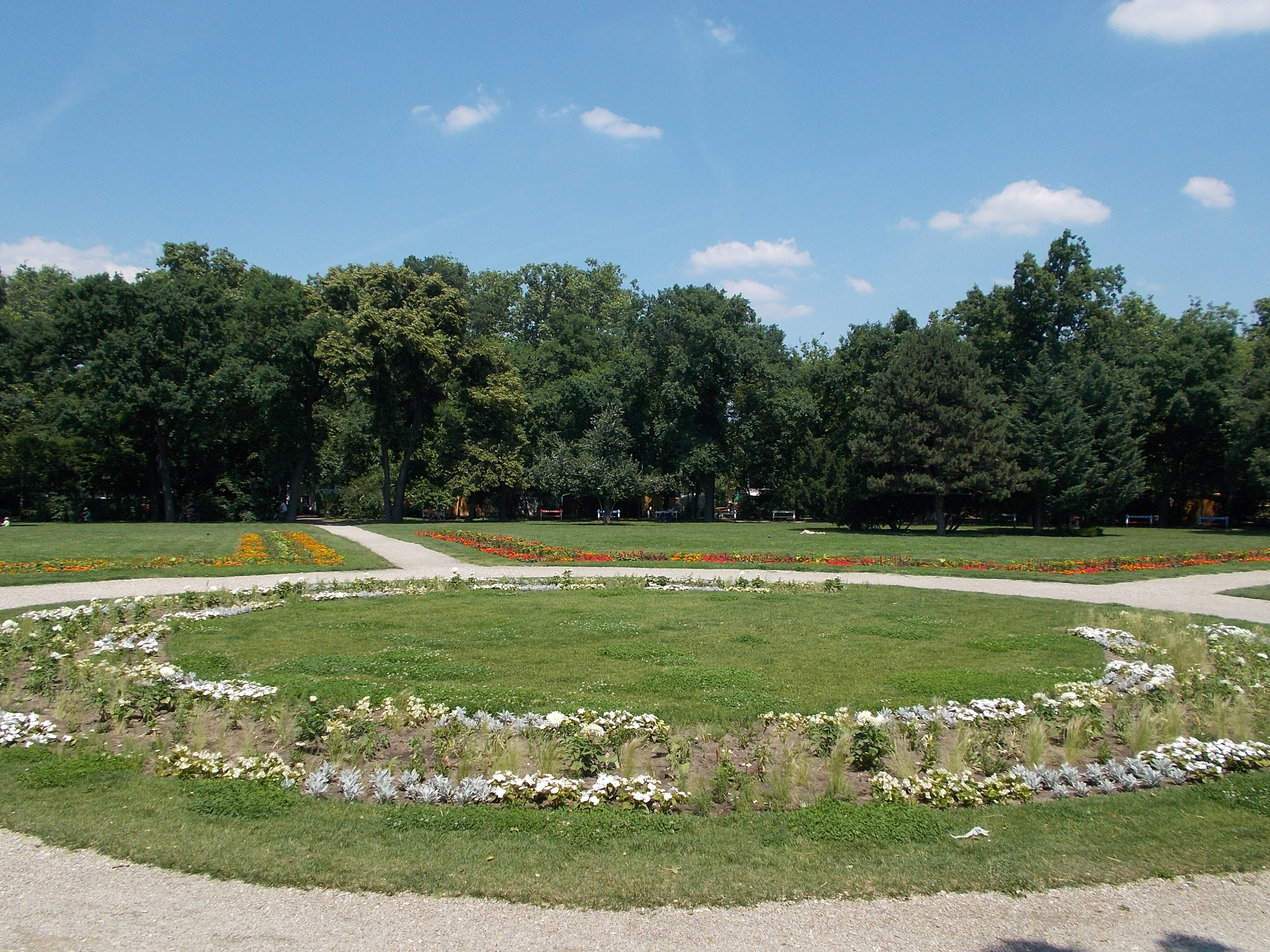 Városliget. GPS 47.511832, 19.082321